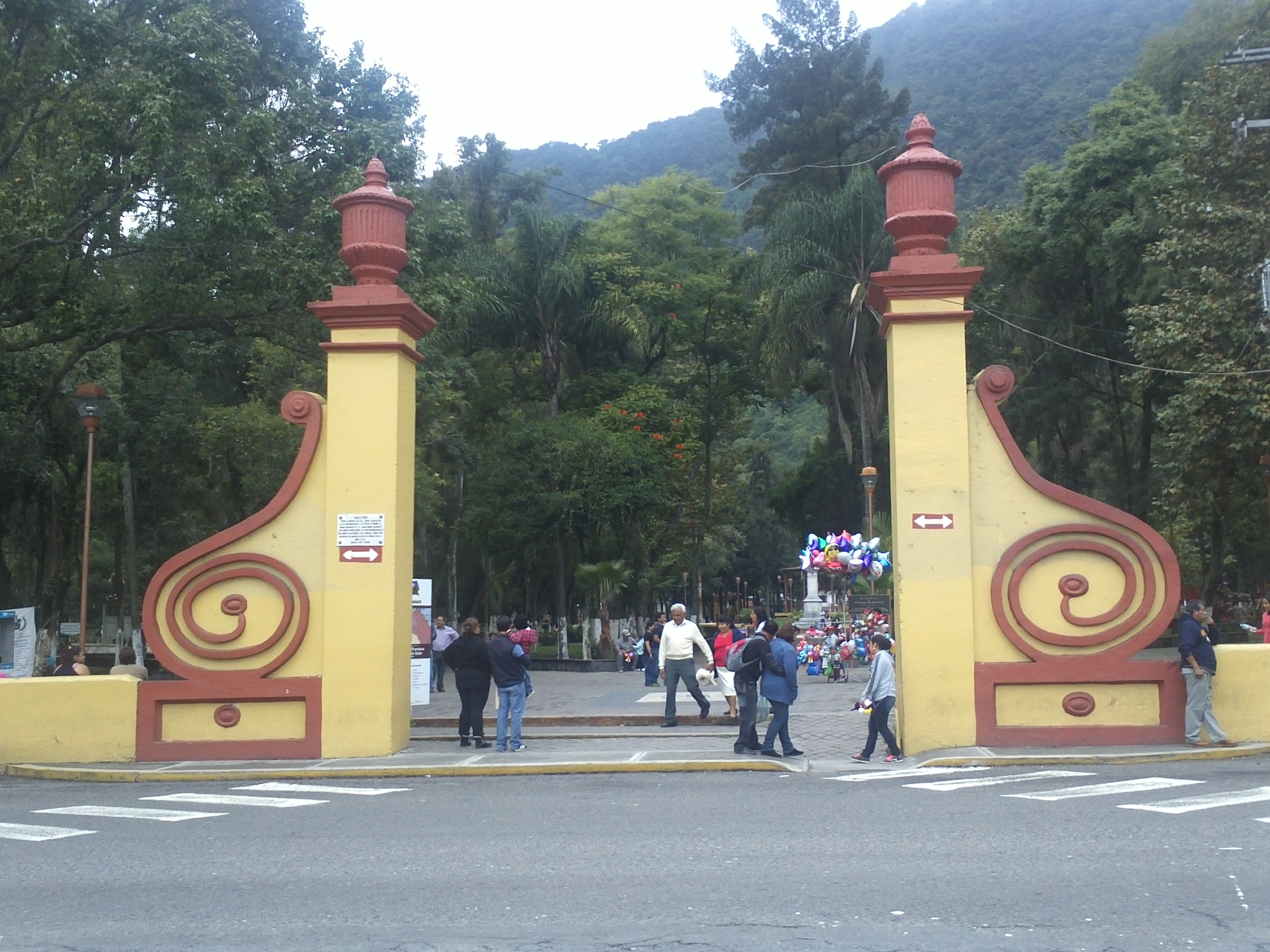 Alameda "Francisco Gabilondo Soler" de Orizaba, Veracruz